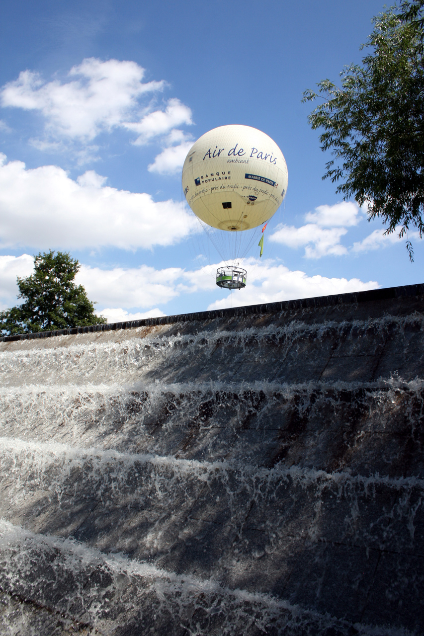 Ballon au Parc André Citroen.